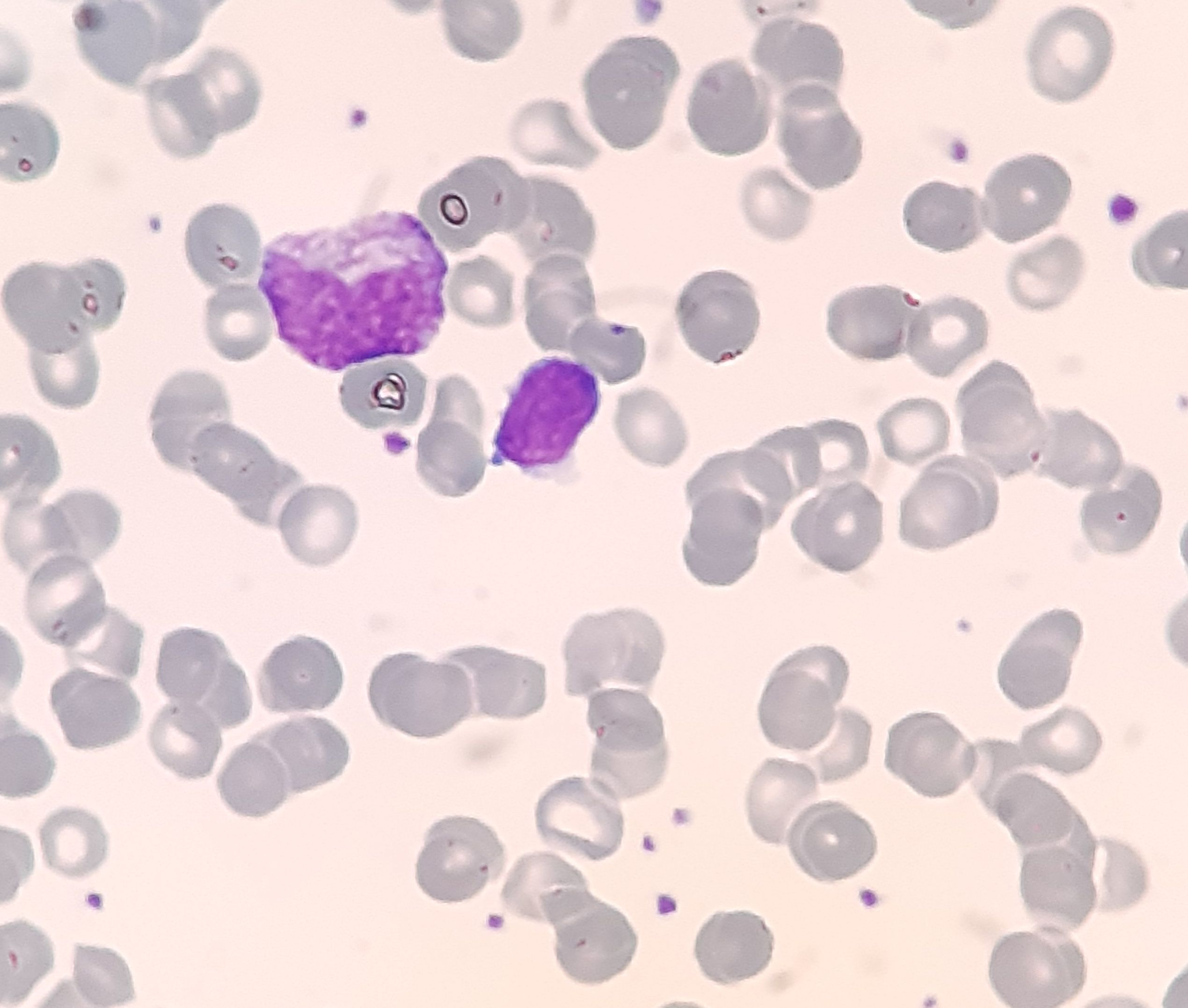 Mielocito (célula grande con núcleo laxo en la parte superior izquierda de la imangen) en una paciente con leucocitosis de predominio neutrofílico (91 %), con desviación a la izquierda (presencia de promielocitos, mielocitos, metamielocitos y cayados de neutrófilos en sangre periférica). Vista con tinción de May-Grünwald-Giemsa modificada para urgencias a 1.000 aumentos. Ligeramente hacia abajo y a la derecha, linfocito normal. En el fondo, hematíes con anisocitosis en grado I y plaquetas normales.